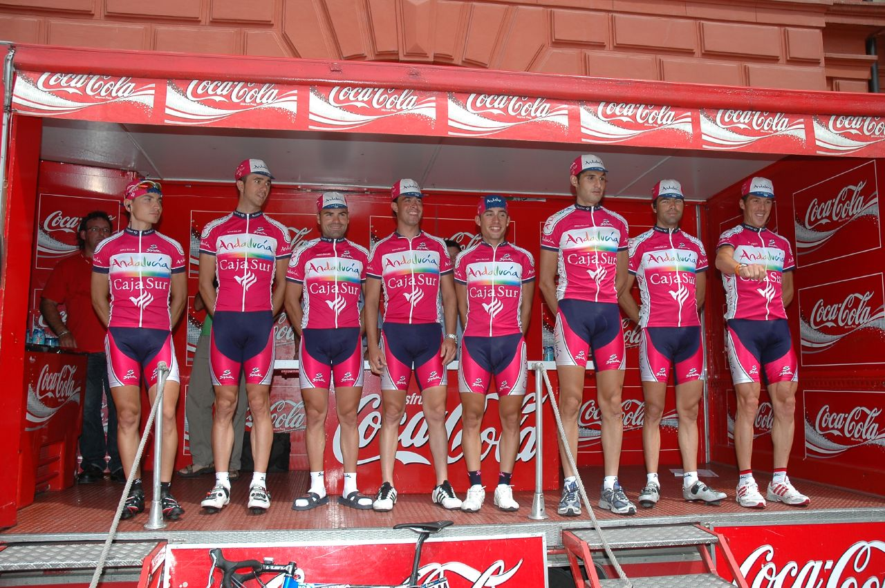 Andalucia-Cajasur, Euskal Bizikleta 2007